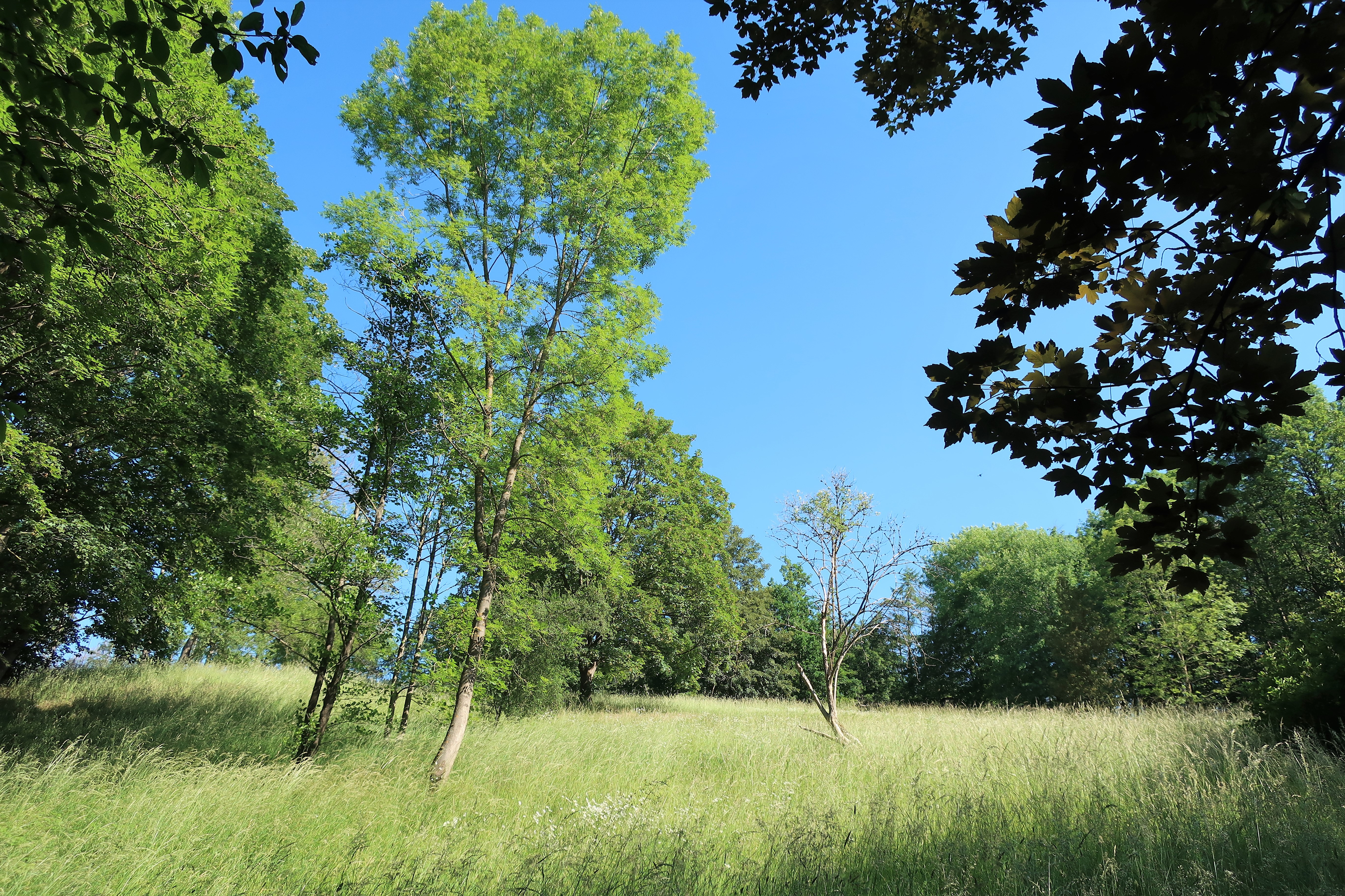 Geschützter Landschaftsbestandteil 1.4.2.17 „Kleingewässer Tiefendorfer Straße“ in Hagen, zwischen Berchum und Tiefendorf nördlich der Tiefendorfer Straße. Es handelt sich um eine Hangwiese mit zwei Kleingewässern.